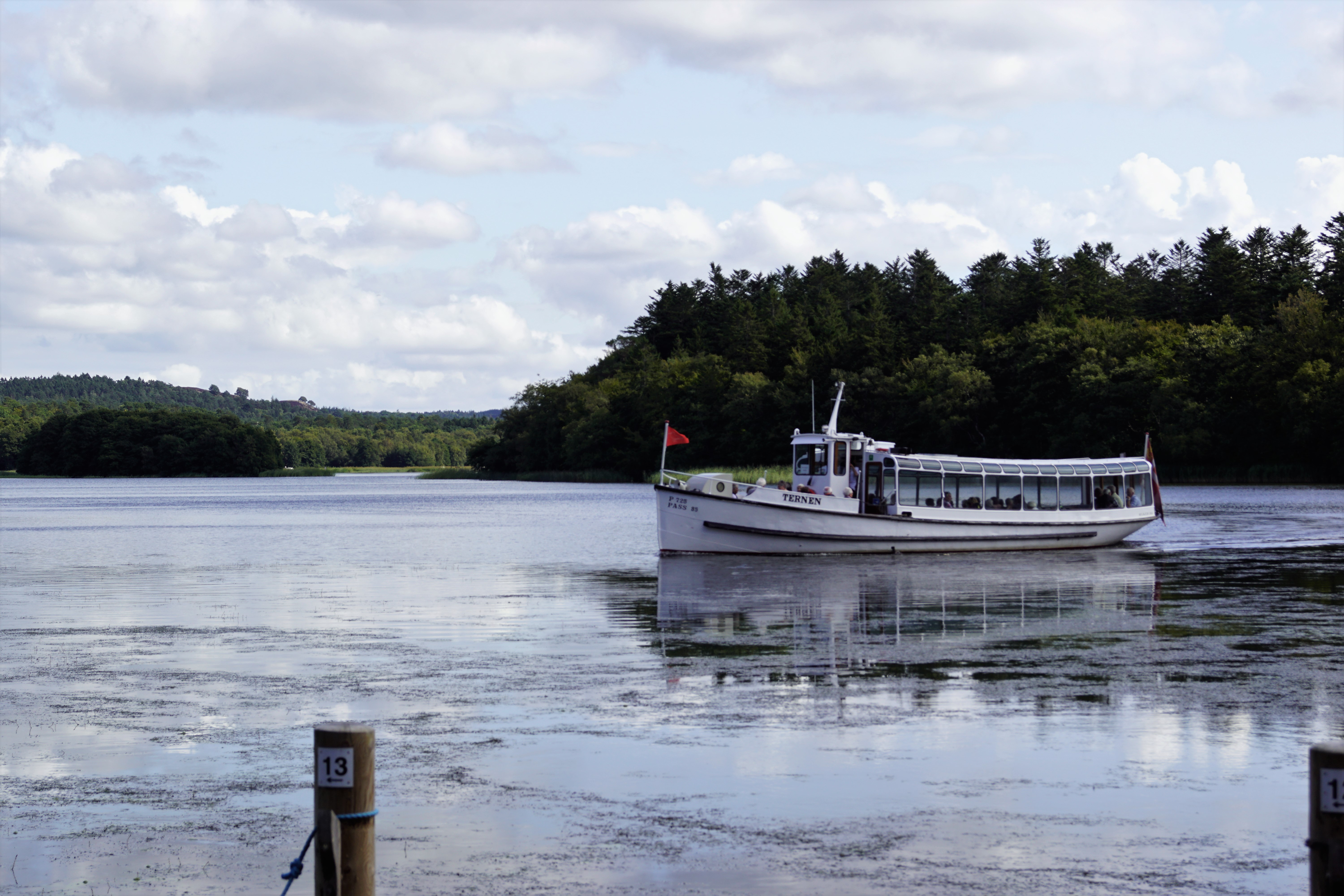 Turbåden Ternen i Skallervig, Brassø